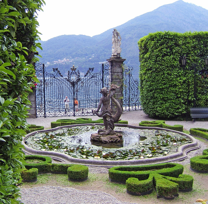 Villa Carlotta in Tremezzo, lake Como, garden 1st terace